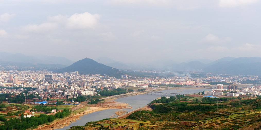 djdgy